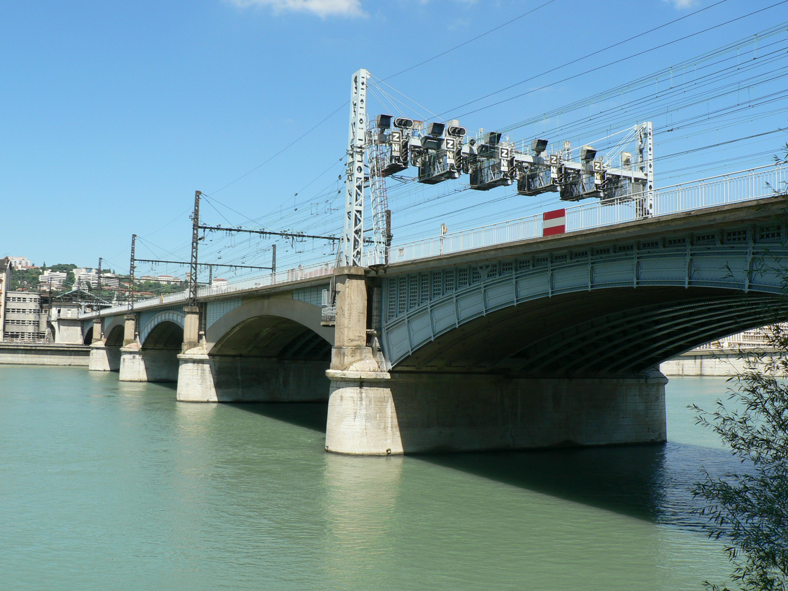 Ponts de Lyon – Viaduc SNCF (Perrache)